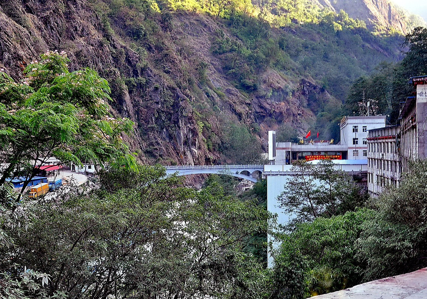 frontière sino-népalaise : pont entre Xhangmu et Kodari, ou Friendship bridge